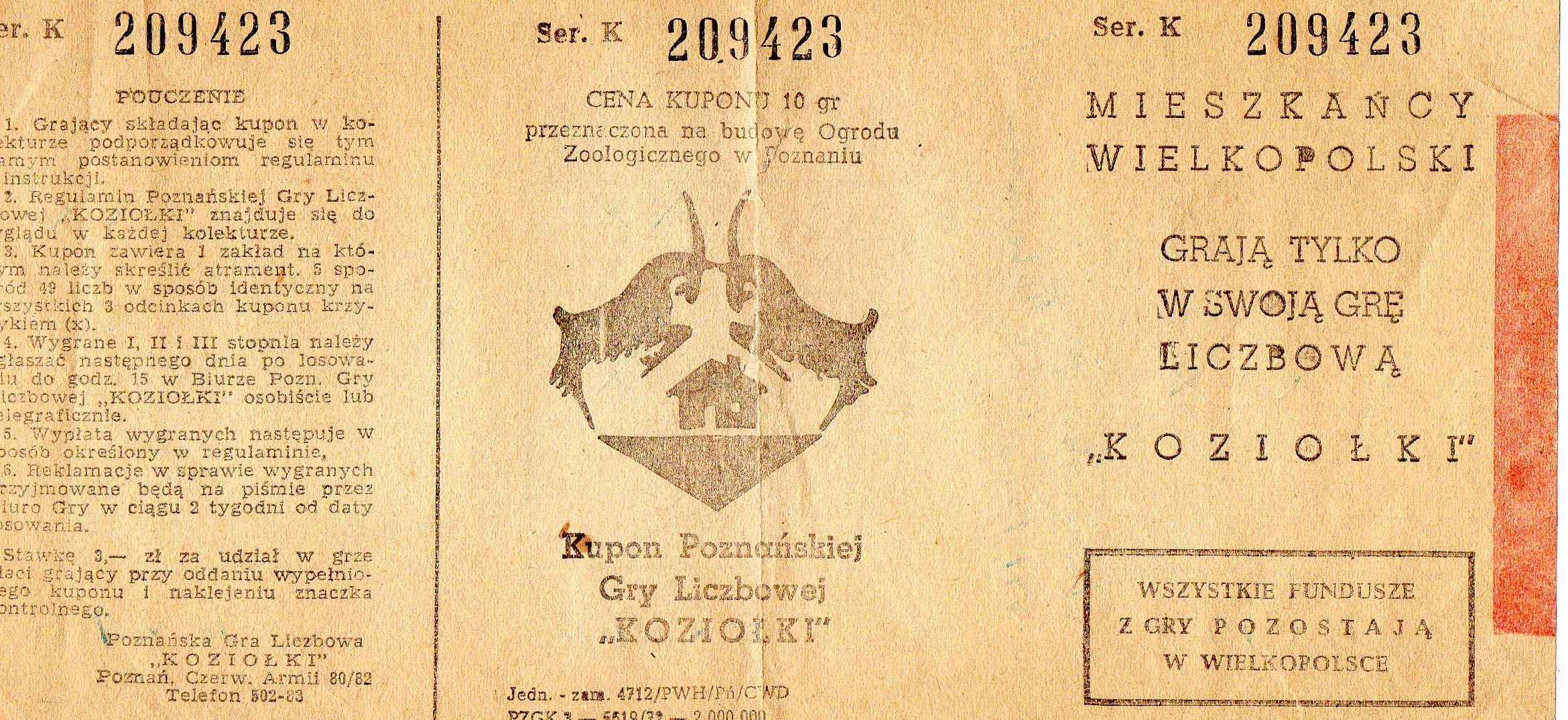 Poznańska Gra Liczbowa Koziołki - kupon z 19.10.1975r.